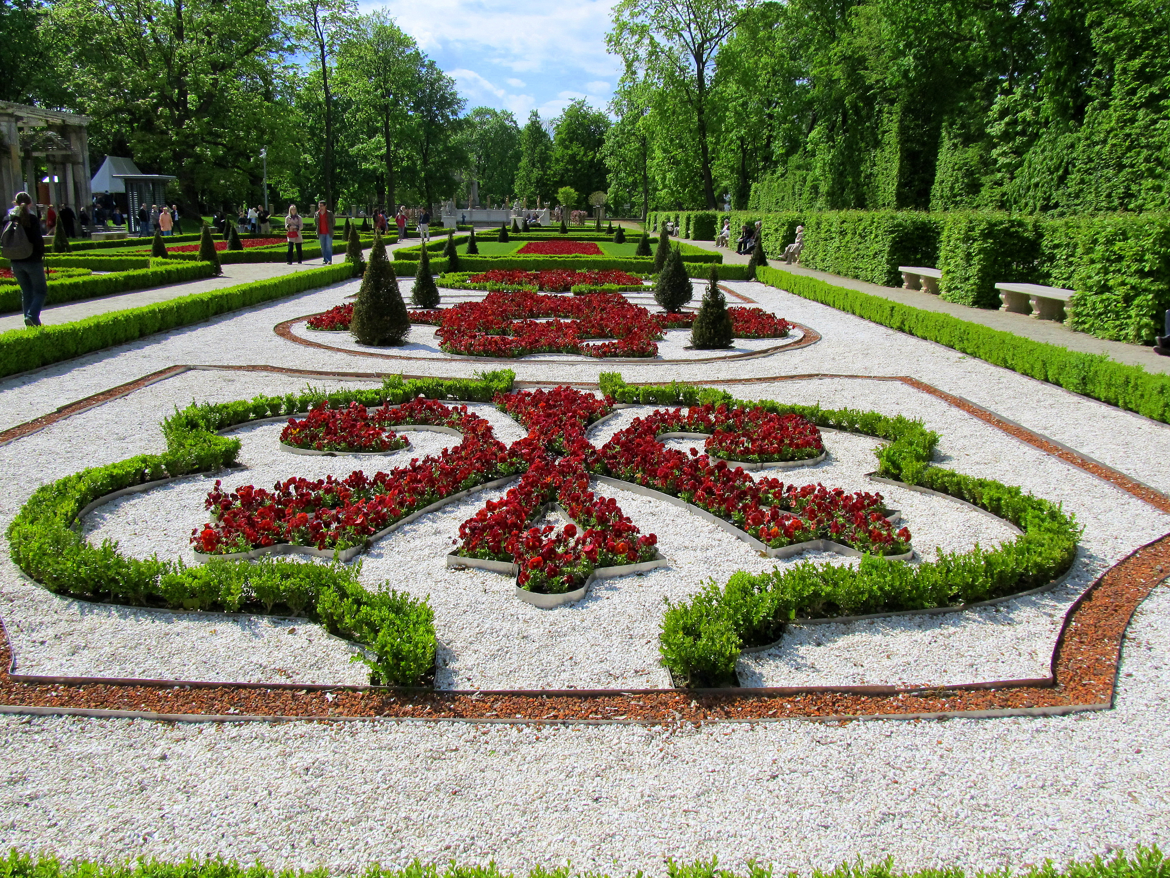 Warszawa, park